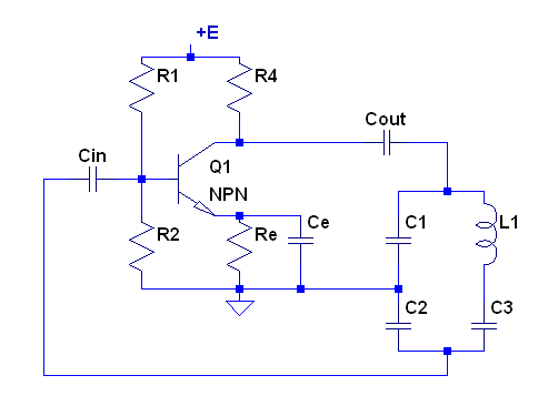 Joonis 4. Clappi ostsillaator.